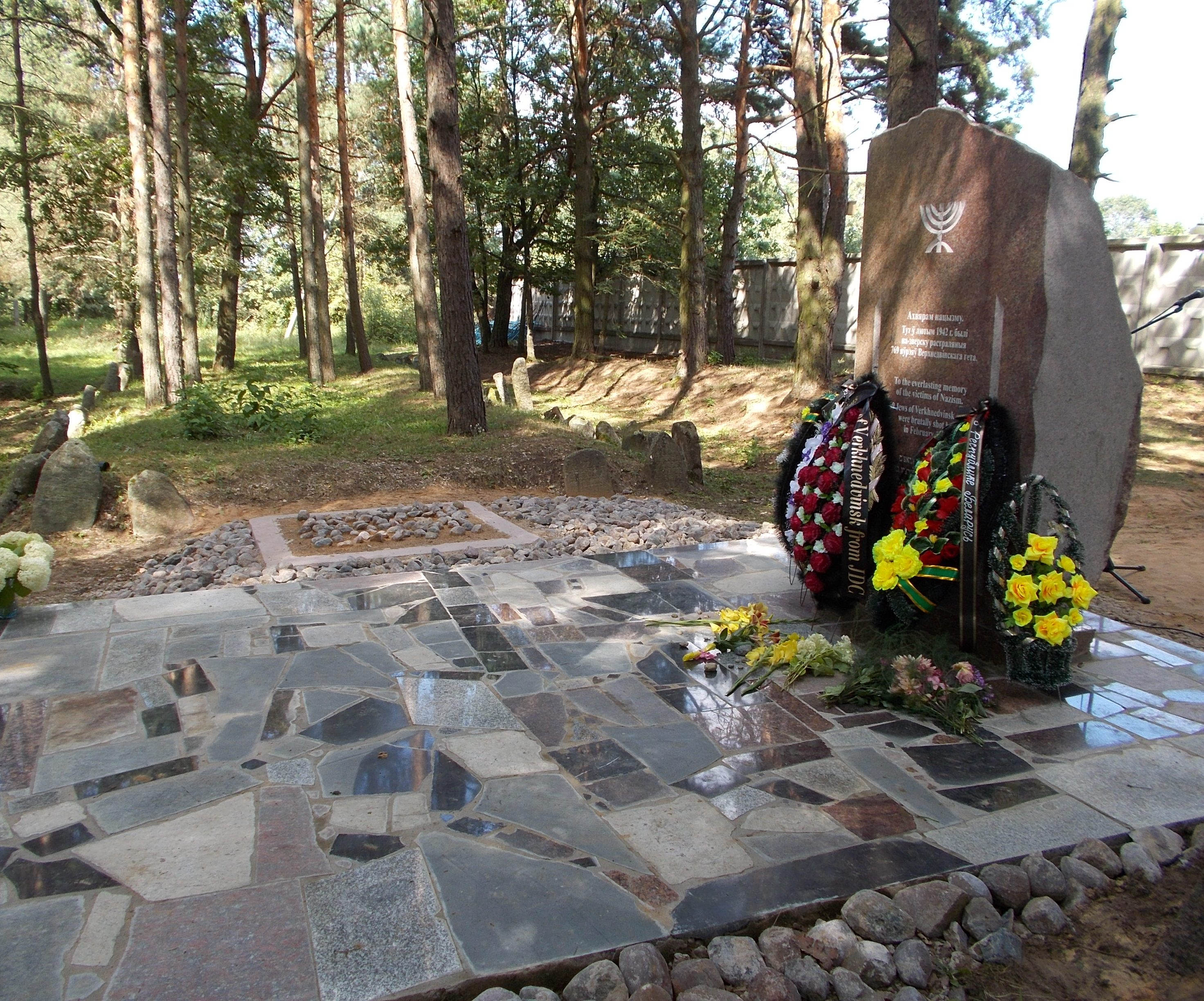 Новый памятник евреям - узникам Верхнедвинского гетто, на еврейском кладбище Верхнедвинска по улице Советской. Установлен в 2013 году.